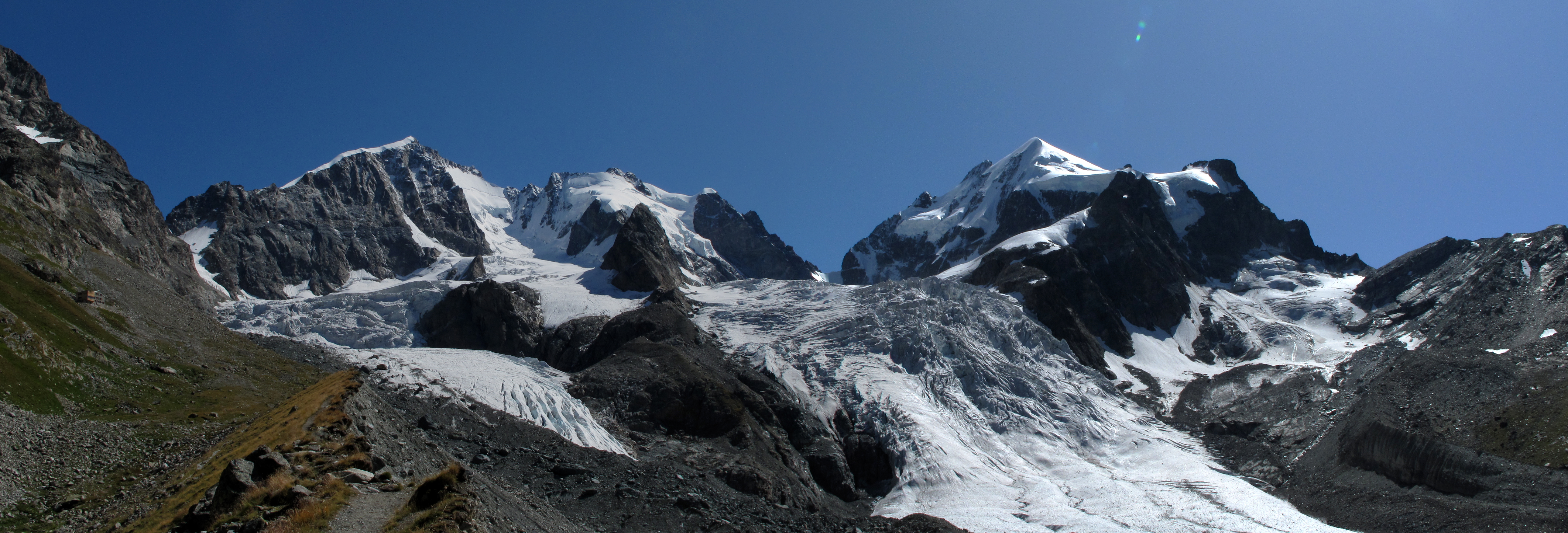 Piz Bernina, Piz Scerscen, Piz Roseg, Tschierva Hütte